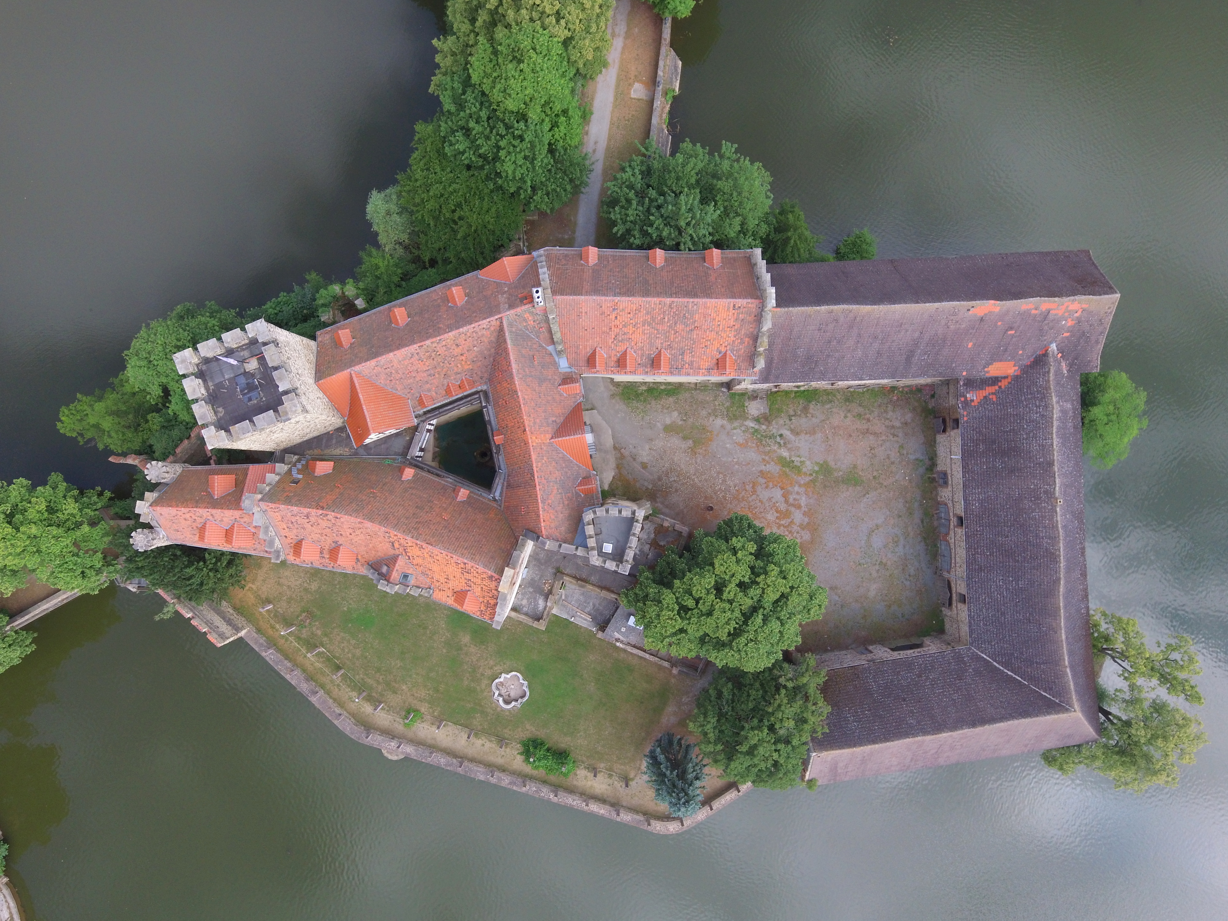 Luftbild Burg Flechtingen